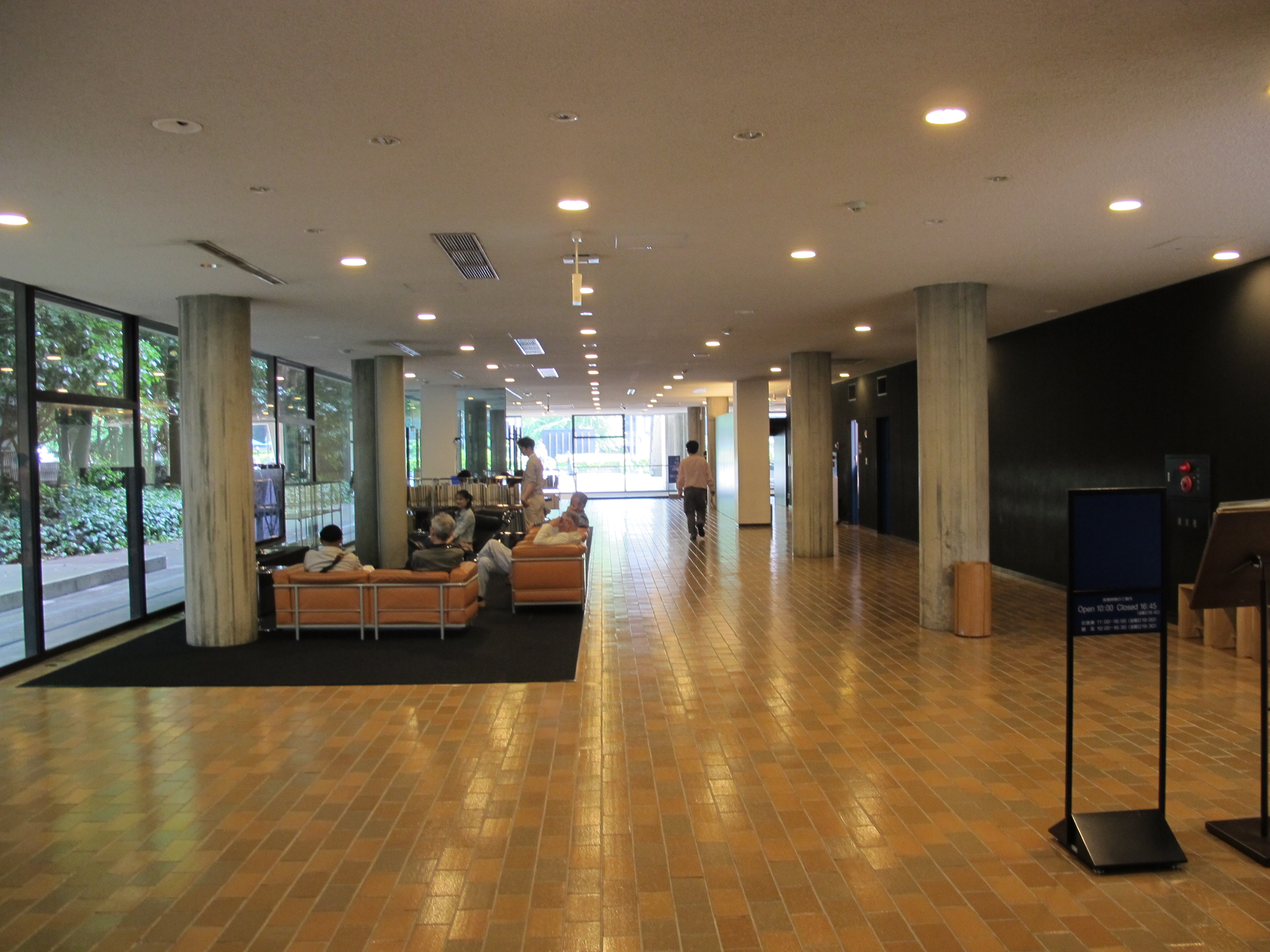 Museo nazionale d'arte occidentale, sala